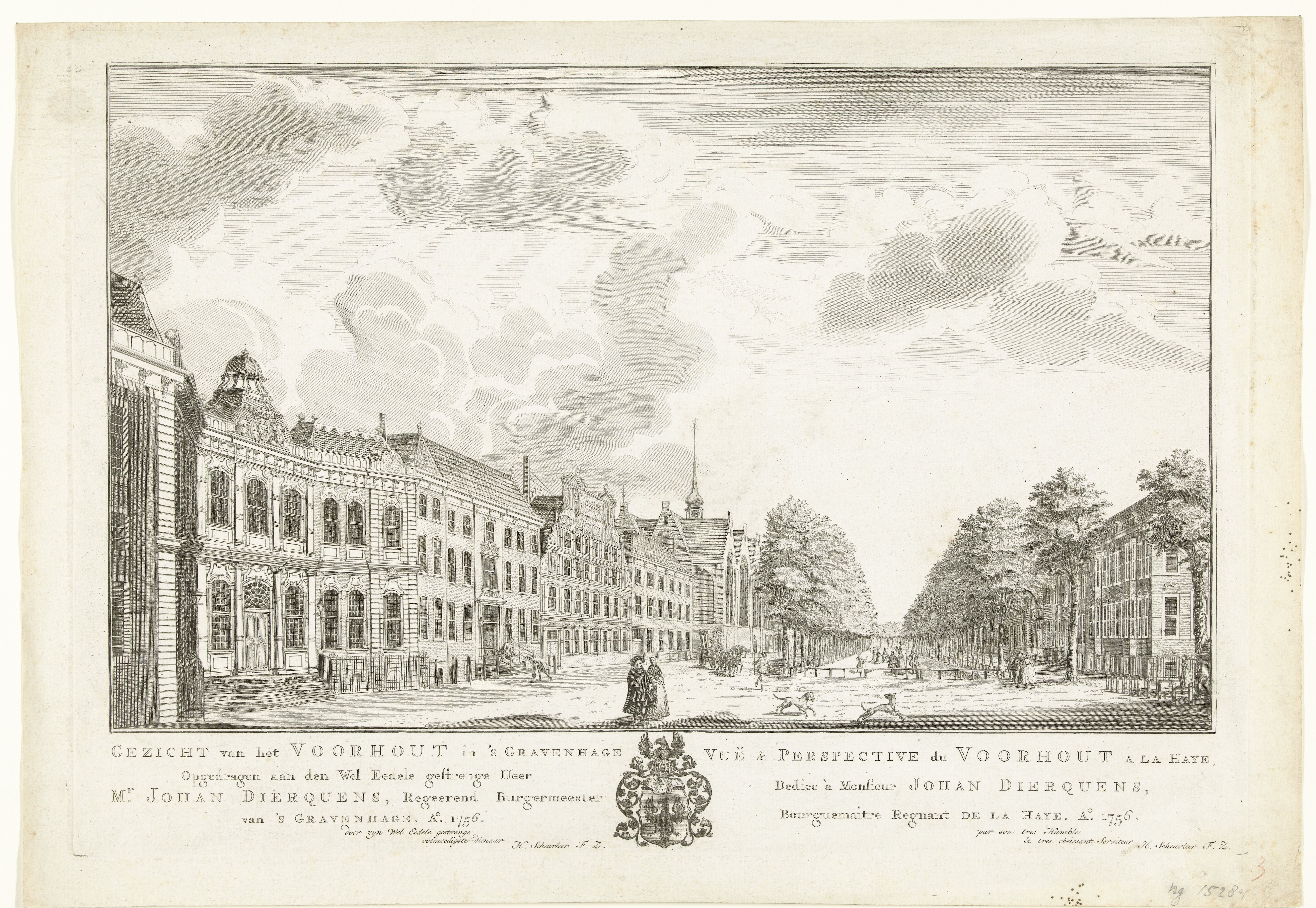 Gezicht op het Voorhout te 's Gravenhage (1756) door Ivan Besoet.